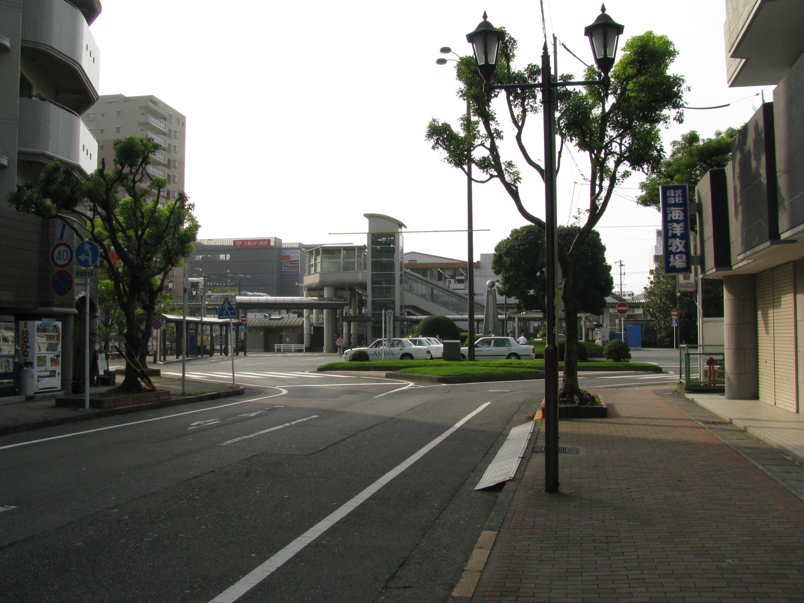 JR東海東海道本線焼津駅